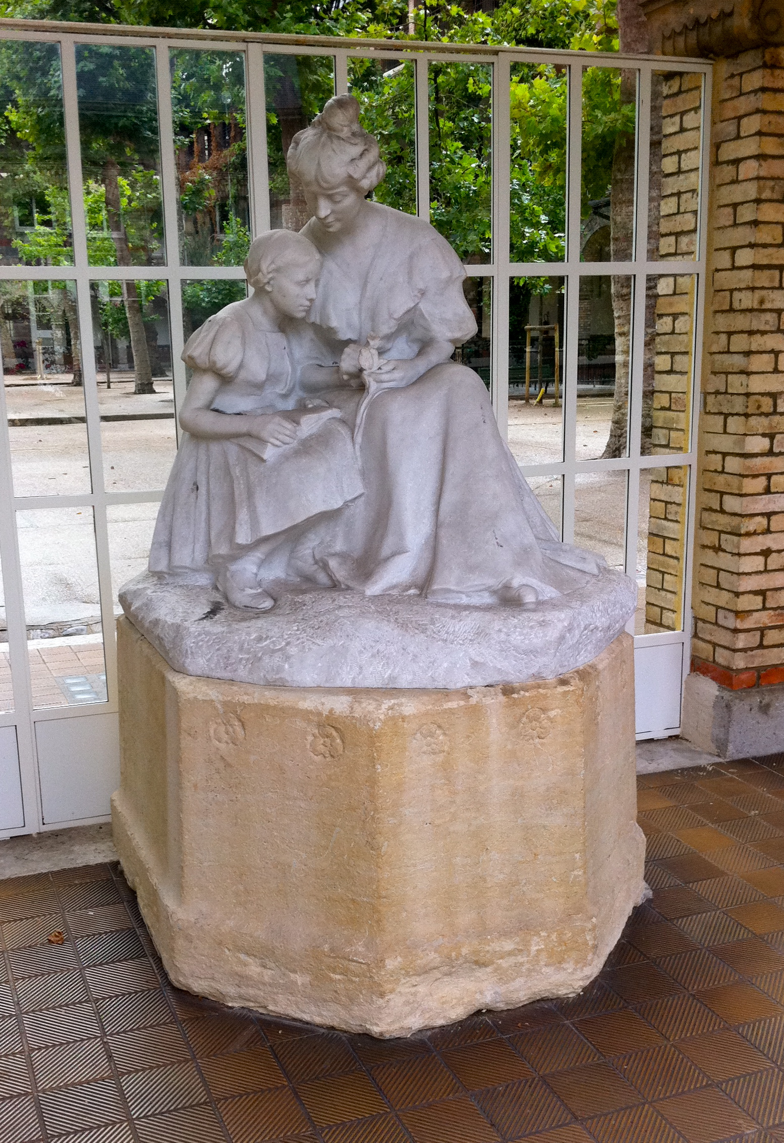 Statue La leçon d'histoire naturelle par Blanche Moria (début des années 1920)